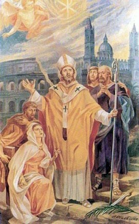 Quadro di San Mamiliano, Santa Ninfa, Eustozio, Proculo e Golbodeo, Martiri